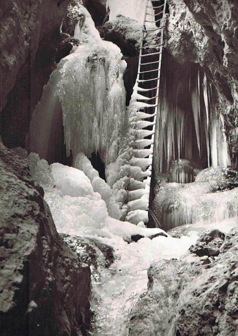 burrone di Mezzacorona - Via ferrata Burrone Giovannelli